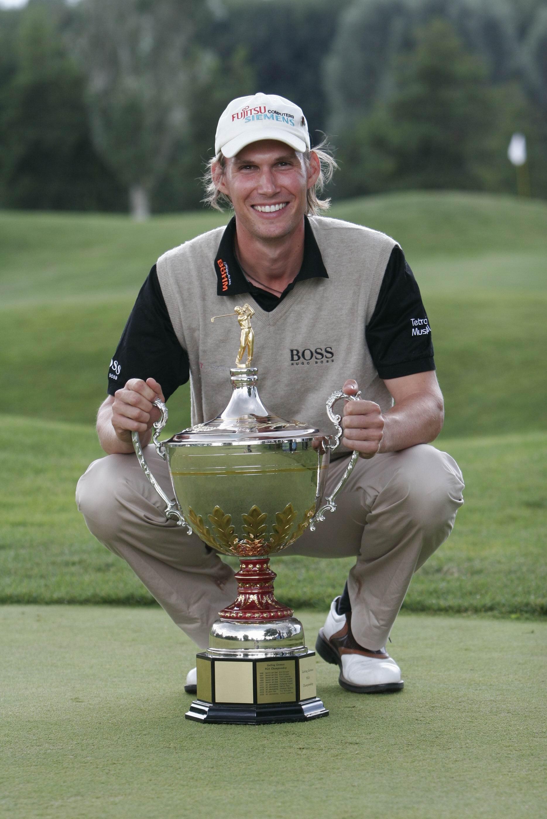 Tino Schuster Gewinner der Deutschen Profimeisterschaft 2006